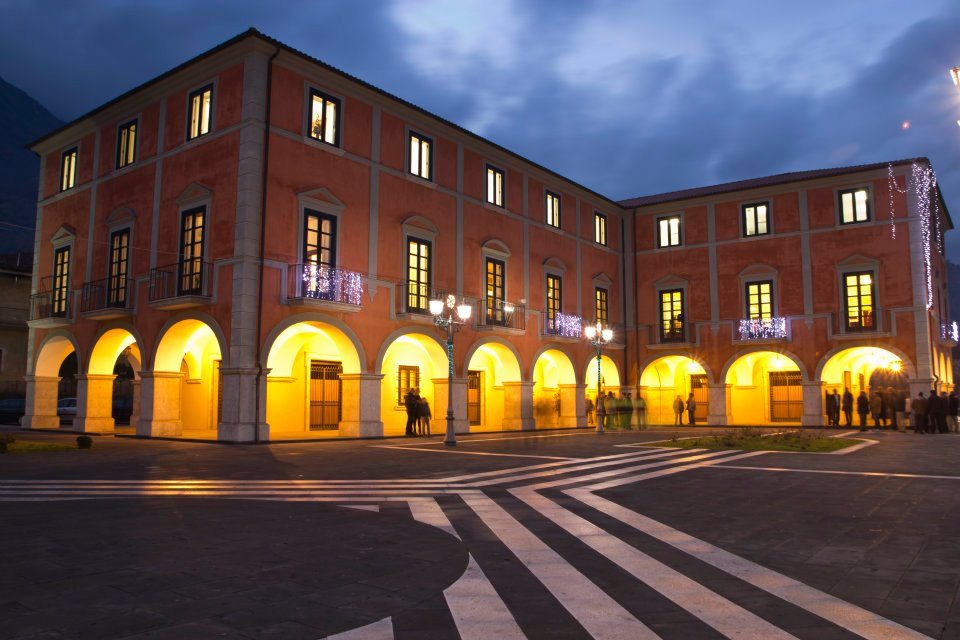 Nuova casa comunale di San Pietro al Tanagro inaugurata il 10 Dicembre 2011.